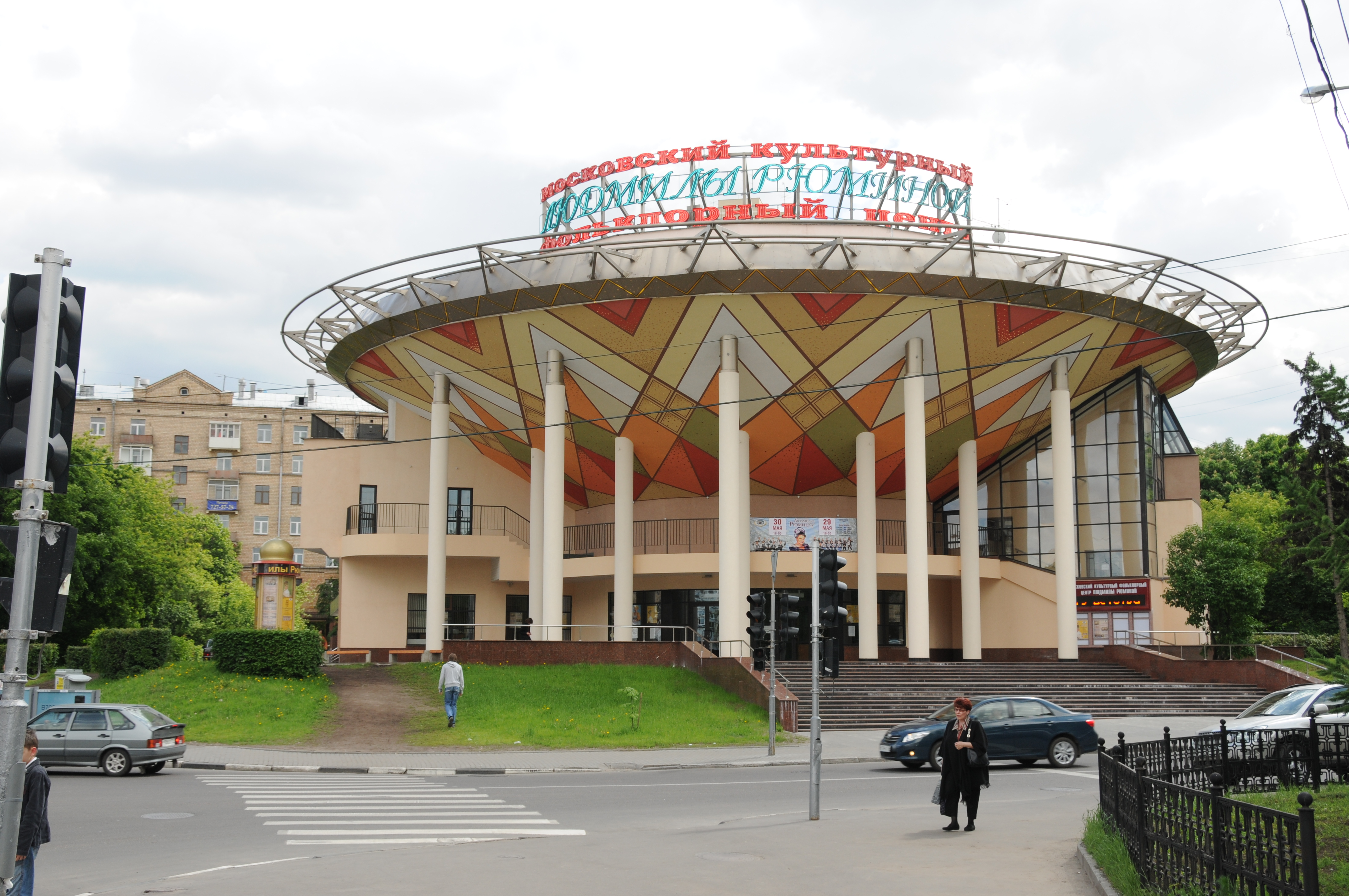 Московский культурный фольклорный центр под руководством Людмилы Рюминой